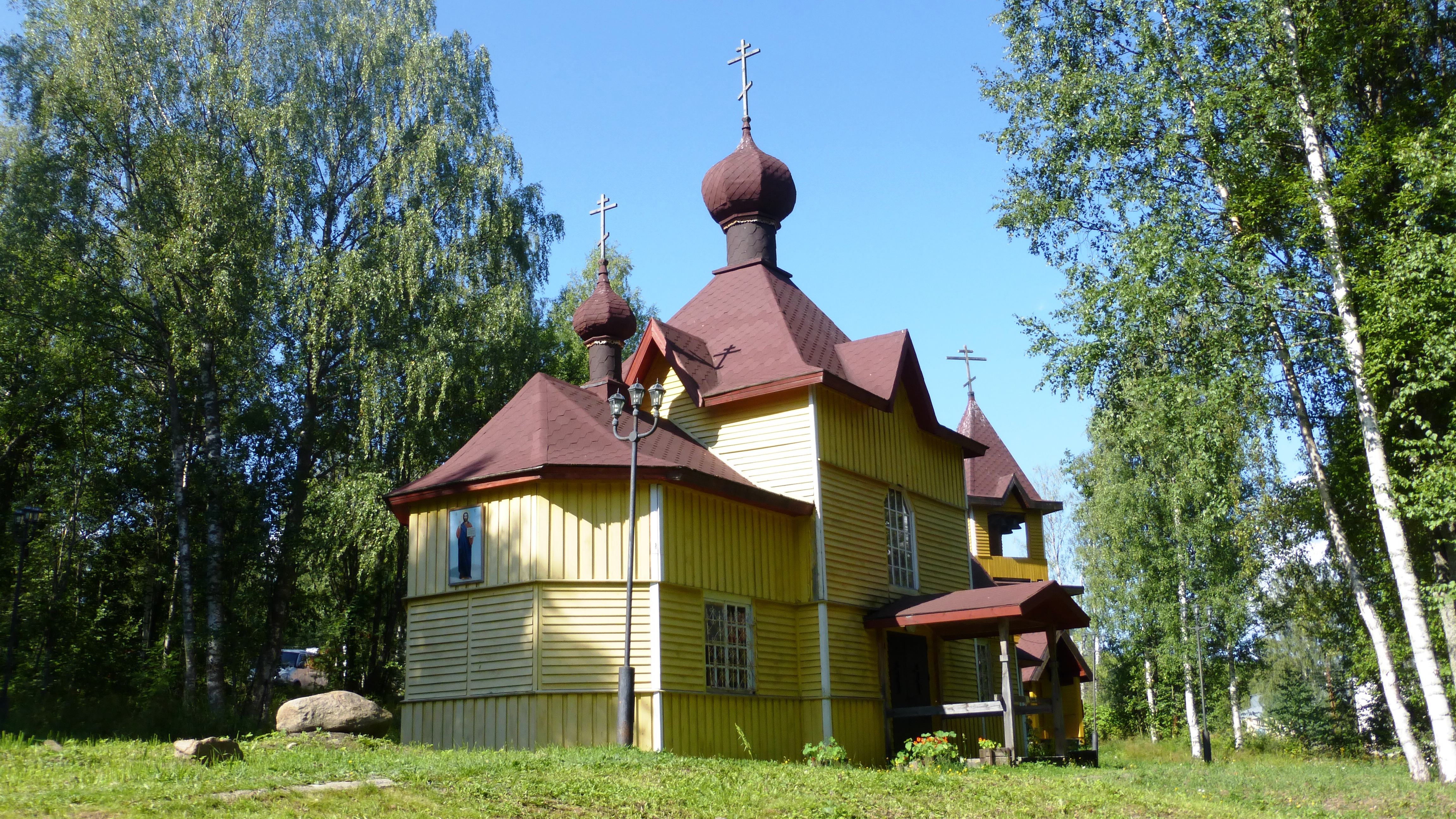 Храм иконы Пресвятой Богородицы "Живоносный источник" в посёлке Марциальные Воды Кондопожского района Республики Карелия